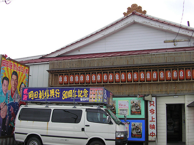 日本・宮城県石巻市中瀬 岡田劇場